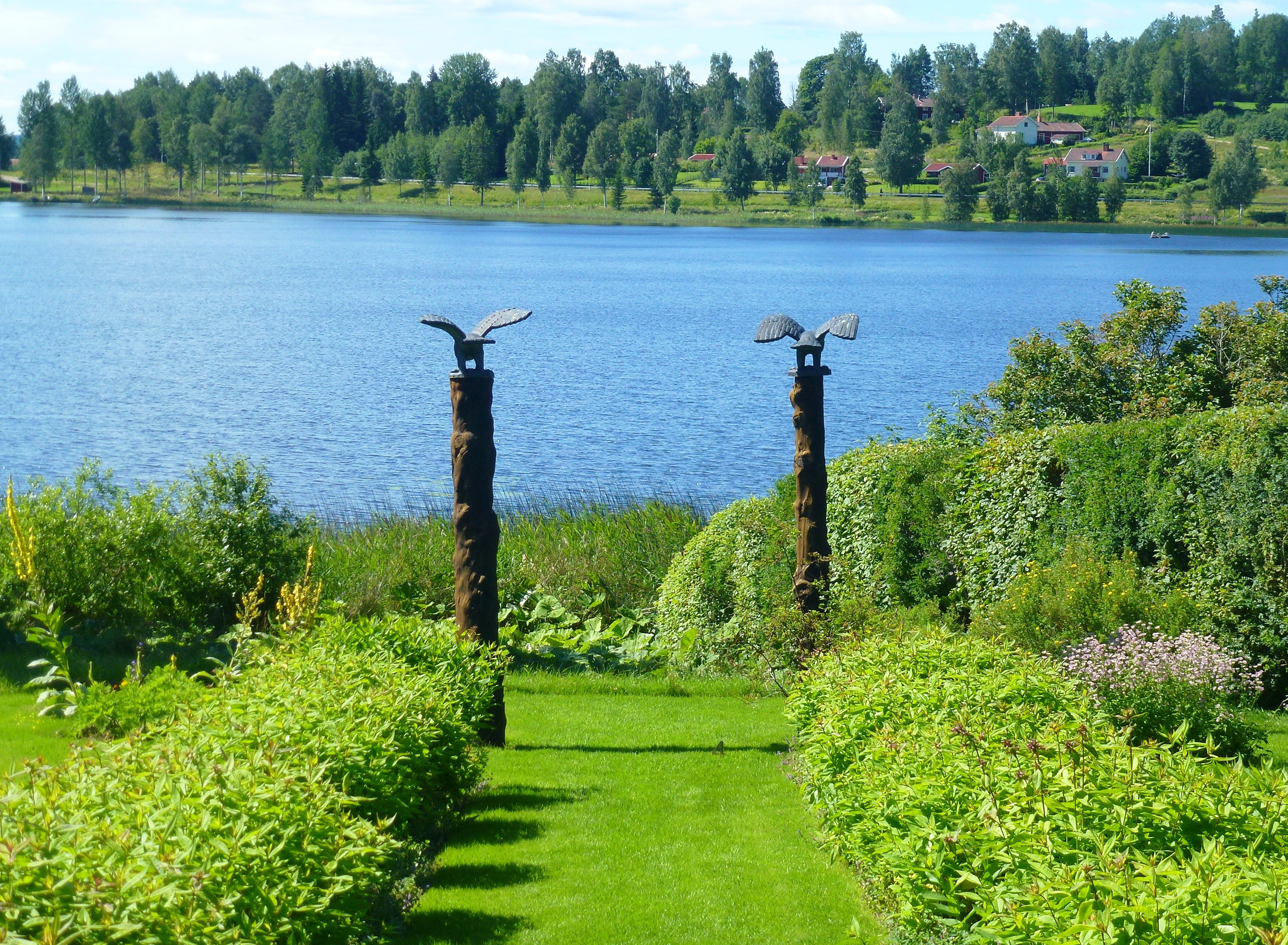 Karlfeldtsgården Sångs i Sjuagre, trädgårdens örnar med sjön Opplimen i bakgrunden